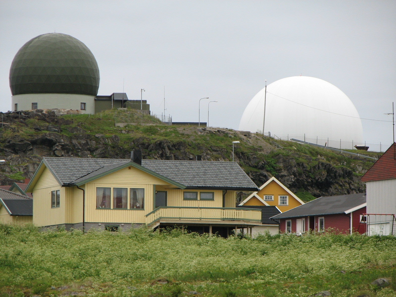 Rømoen i Vardø med radarene i bakgrunnen.